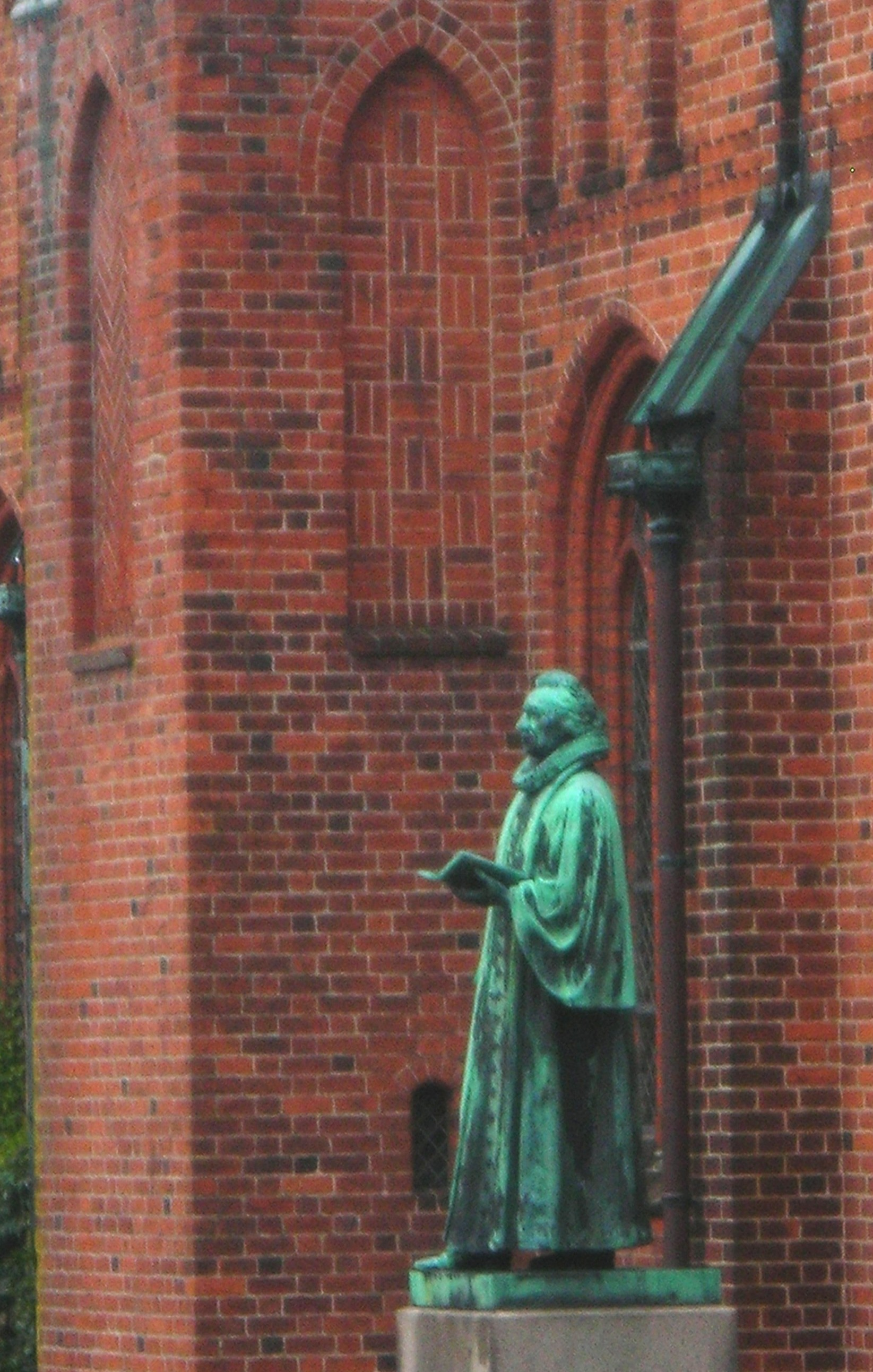 Piispa Hans Adolph Brorsonin patsas tuomiokirkon vierellä.